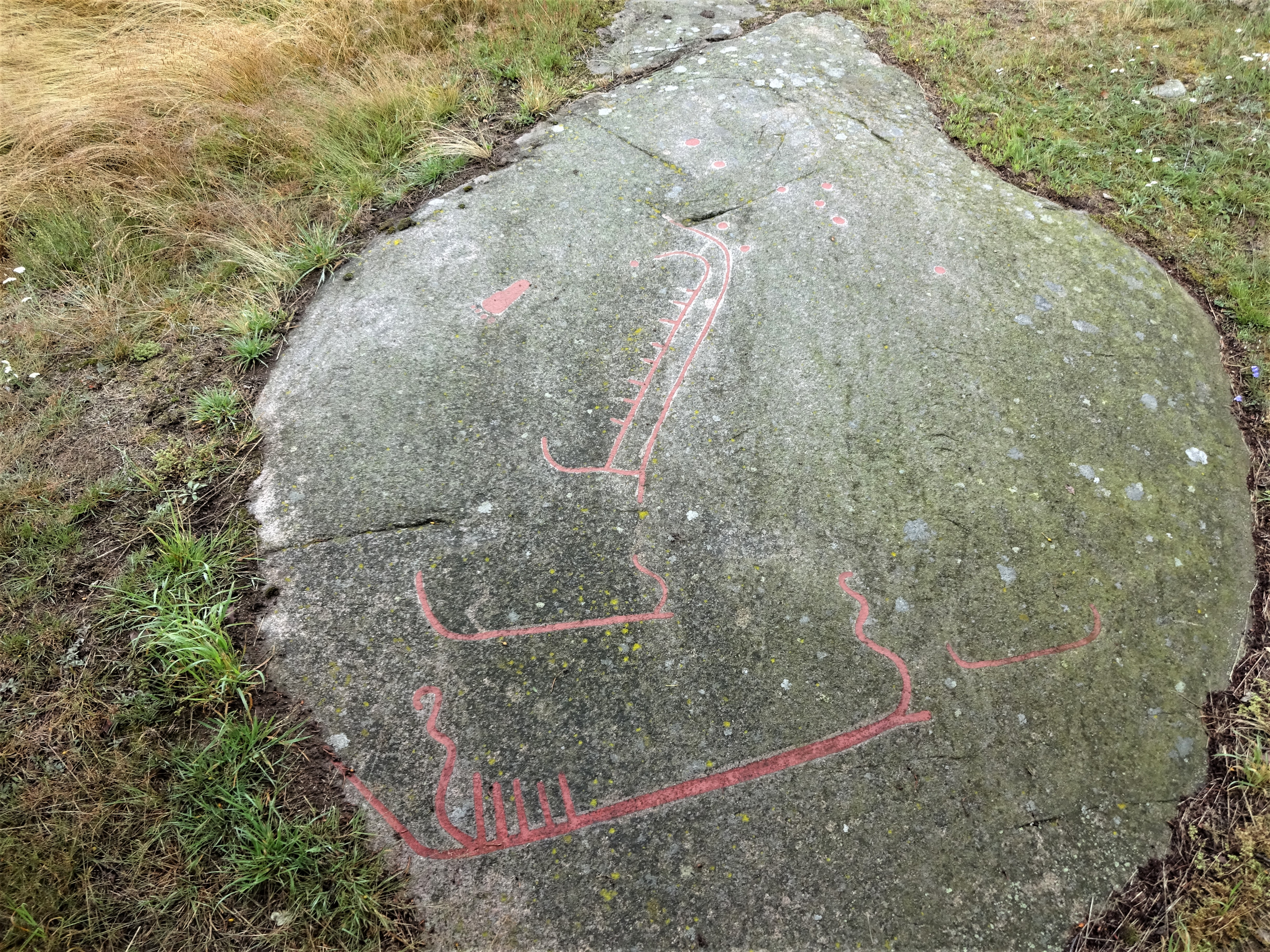 Gesamtsicht Storlökkebakke